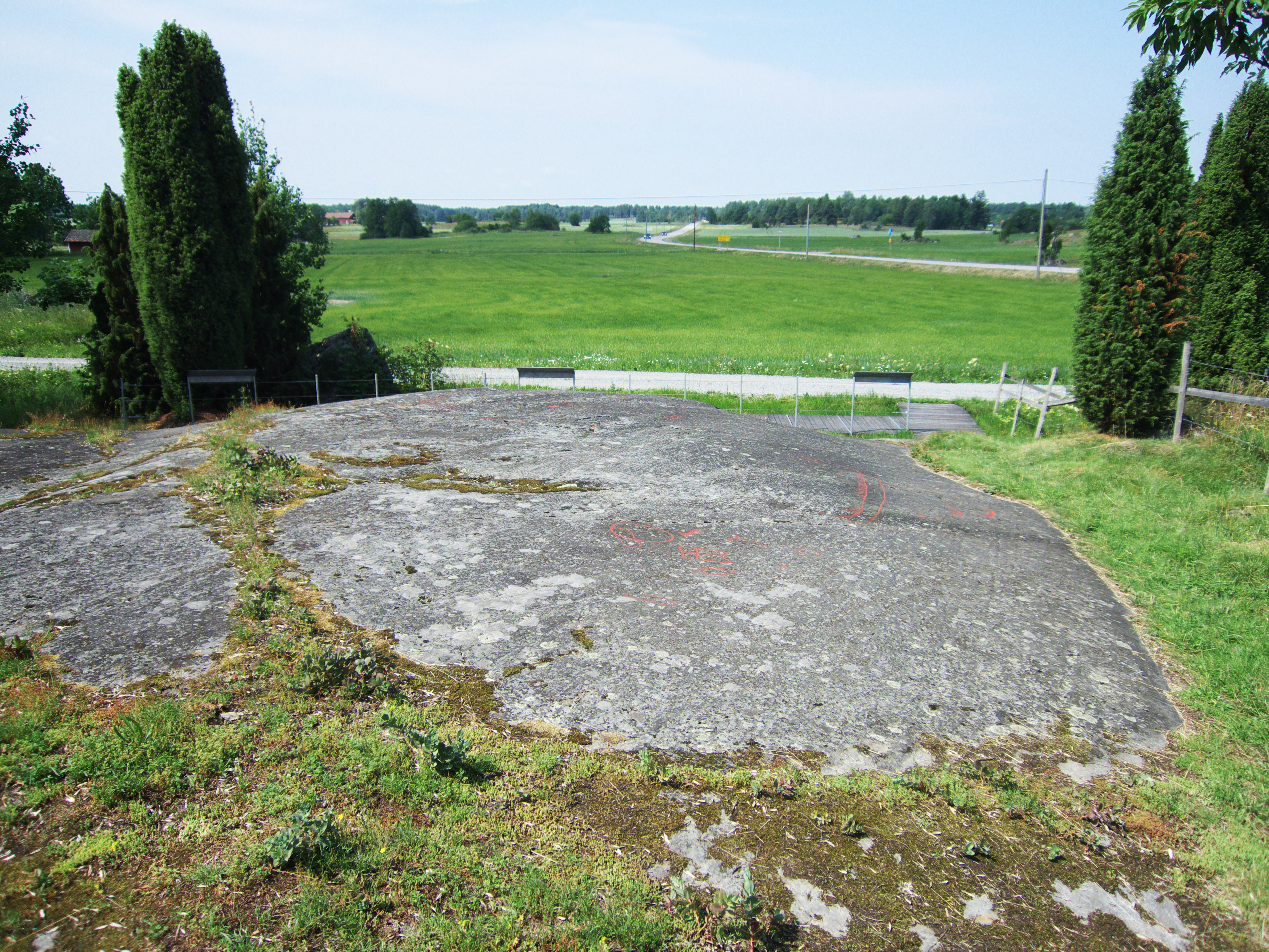 Stora Rickebyhällen, Boglösa socken